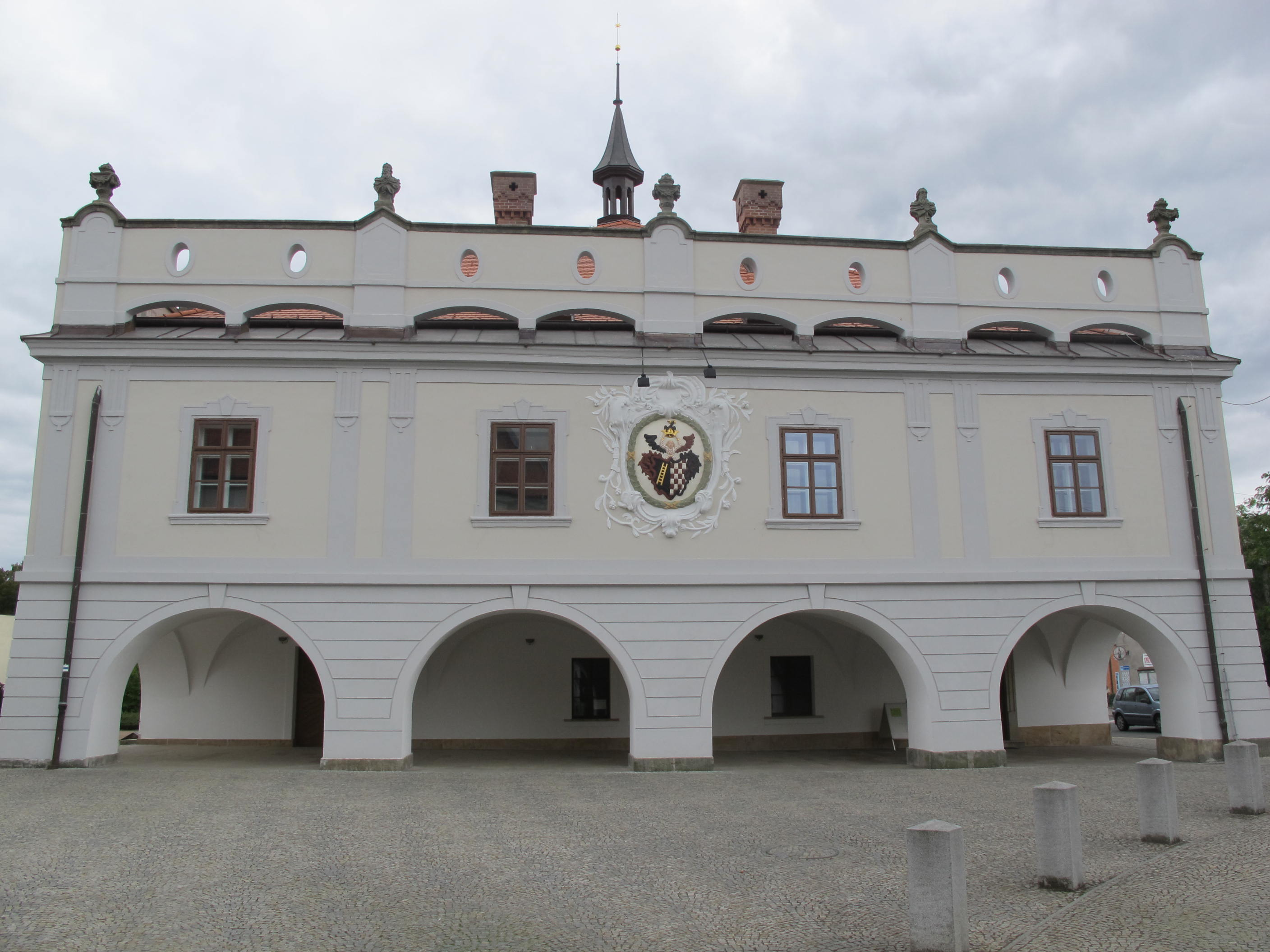 Lázně Bohdaneč barokní radnice na náměstí